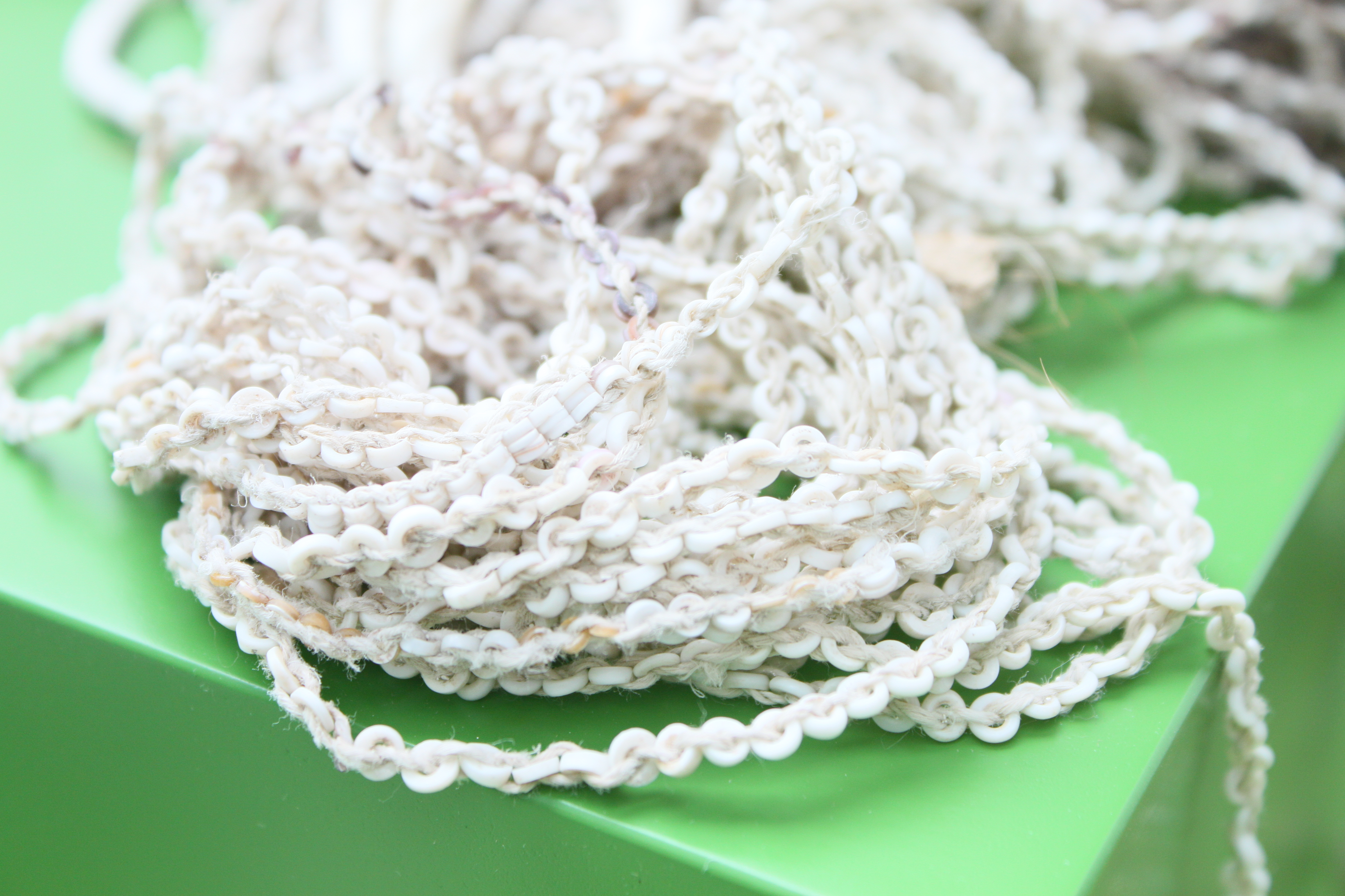 Muschelgeld; Insel Neuirland im Bismarck-Archipel; Papua Neuguinea; um 1900.Bei Hochzeitszeremonien auf der Insel Manus (Taui oder Große Admiralitätsinsel, Papua-Neuguinea) werden große Mengen an Gaben zwischen den Verwandten der Braut und denen des Bräutigams getauscht. Das jeweilige Verwandschaftsnetz umfasst viele Personen, die vor dem Fest auf ihrer Seite Beiträge sammeln. Auf der Seite der Braut sind dies Nahrungsmittel (Schweine, Sago, Taro und gekaufte Produkte wie Reis, Mehl und Konservenfleisch), Kleidung und Haushaltsgeräte. Auf der Seite des Bräutigams sind es besondere Wertobjekte. Früher waren es Hundezahn- und Muschelgeld (Hundezahngeld?) sowie Kokusnussöl, heute sind es vorwiegend Banknoten in der nationalen Währung. Mehrere Tausend Euro können so zusammenkommen. Am Festtag werden die Gaben an die jeweils andere Seite übergeben. Durch die Beteiligung am Tausch betonen die Verwandten ihre Zugehörigkeit.